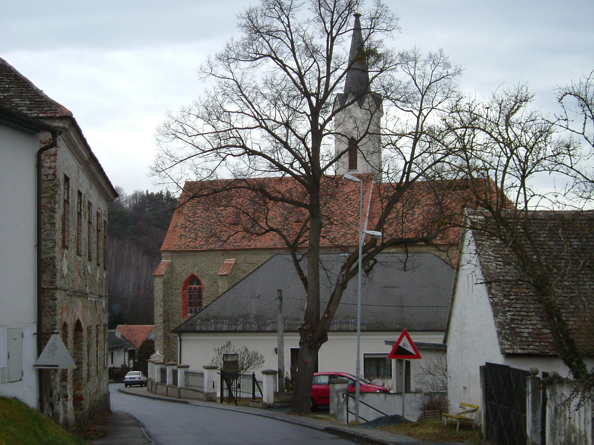 Városszalónak. Plébániatemplom (egykori pálos-templom) (Burgenland, Ausztria)